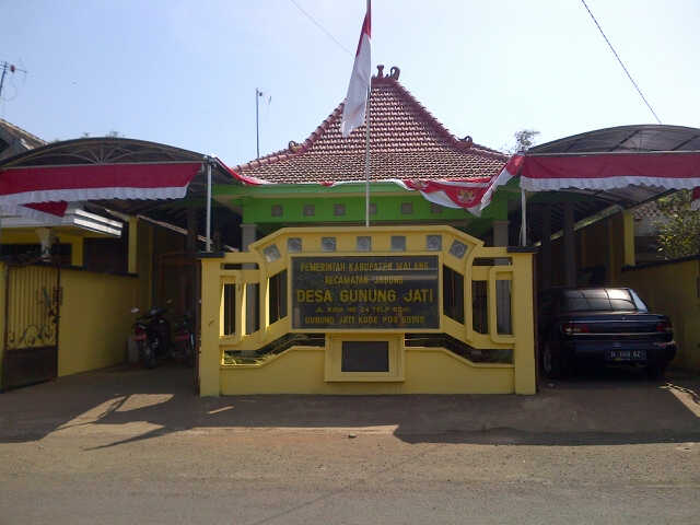 Foto Kantor dan Balai Desa Gunung Jati Kecamatan Jabung